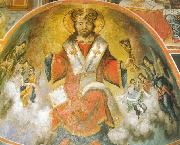 Христос Велик Архиерей, Тома Вишанов, стенопис в олтарната апсида на църквата „Св.Евангелист Лука“.